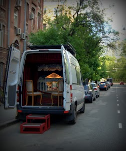 Скорая театральная помощ